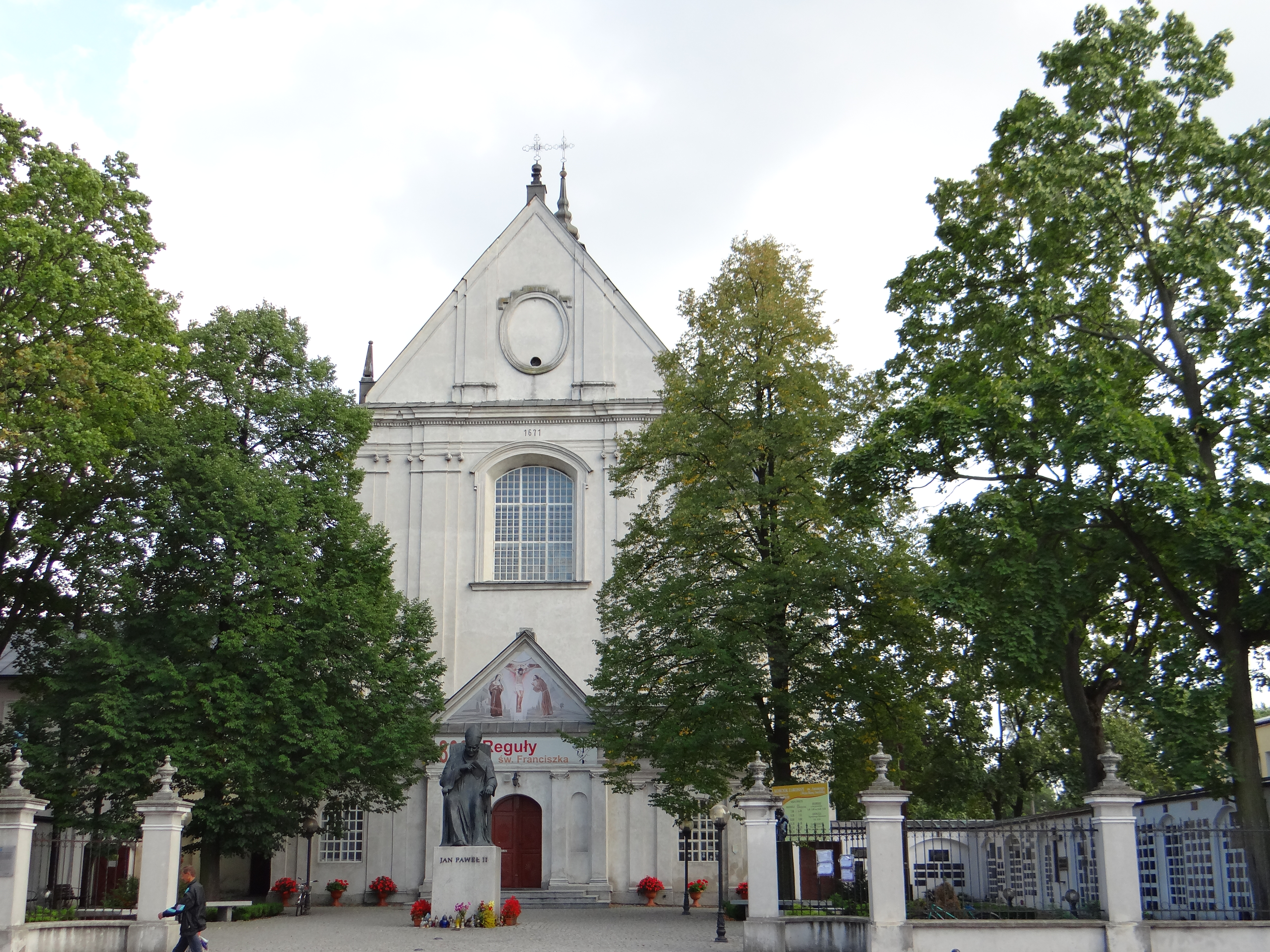 Kościół św. Antoniego w Białej Podlaskiej